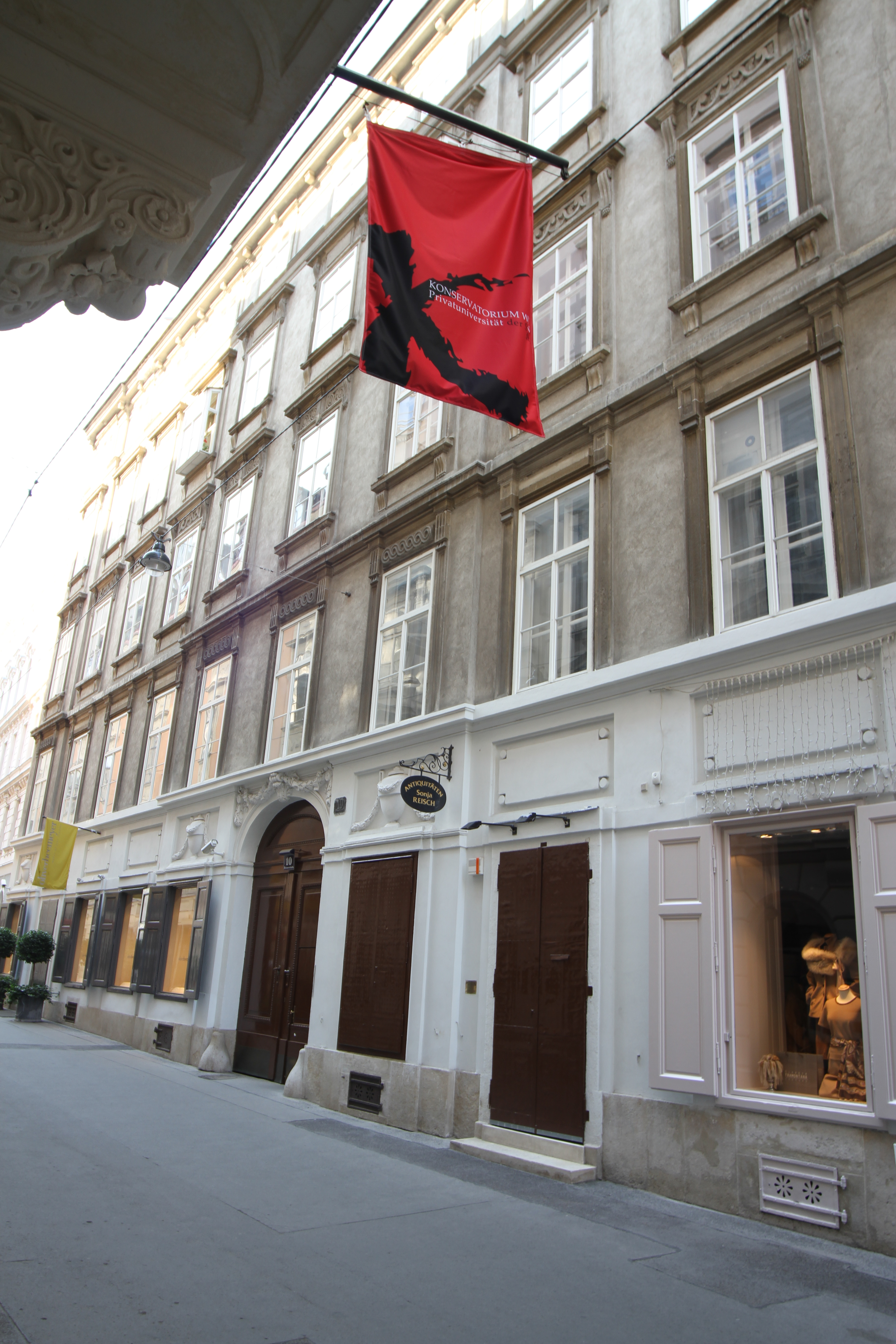 Hohenfeld'sches Freihaus